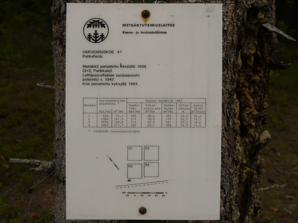 Arboretum Punkaharju: Infotafel über Ausdünnungsversuch